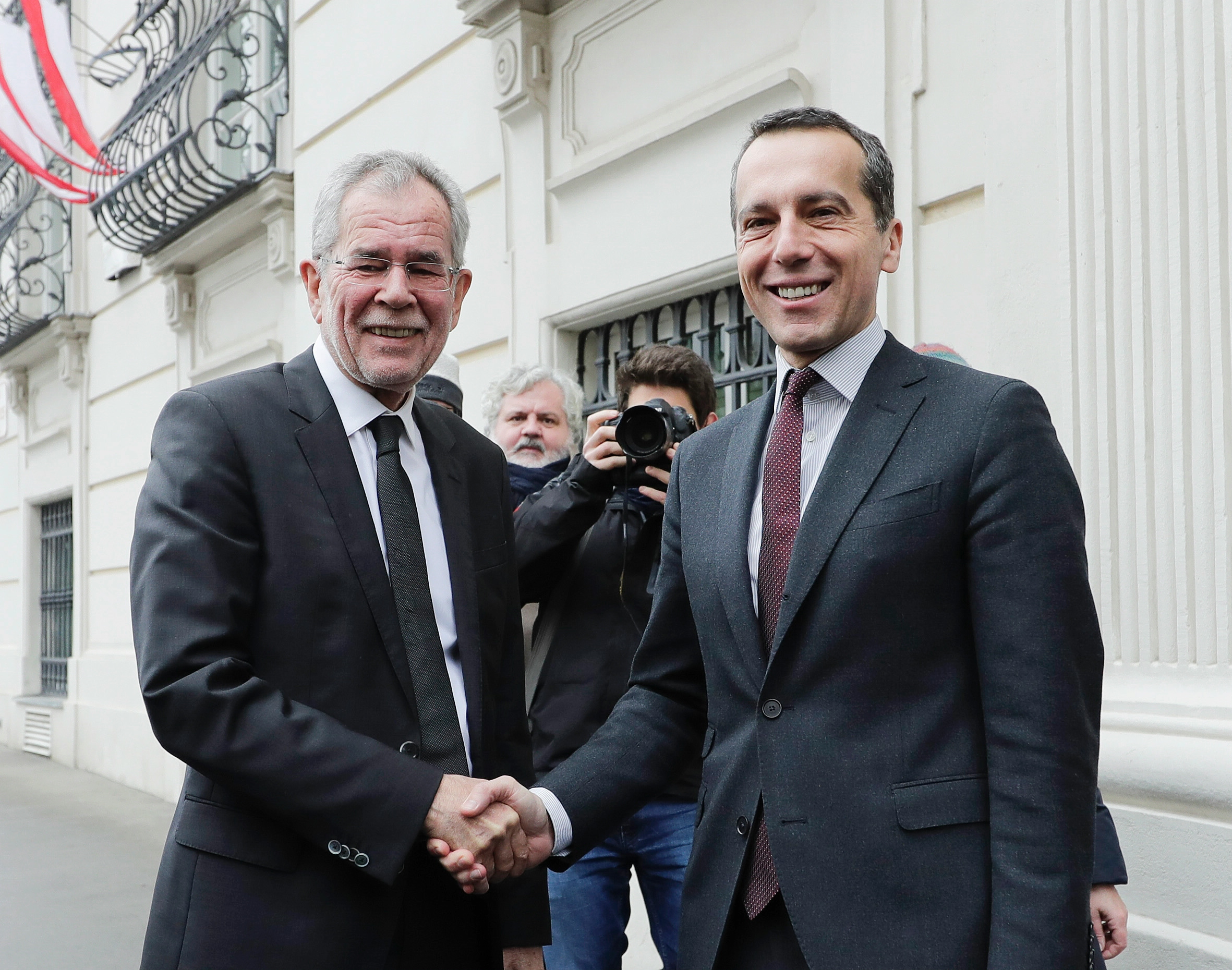 Bundeskanzler Christian Kern gratuliert Alexander Van der Bellen zum Wahlsieg (BKA/Wenzel).